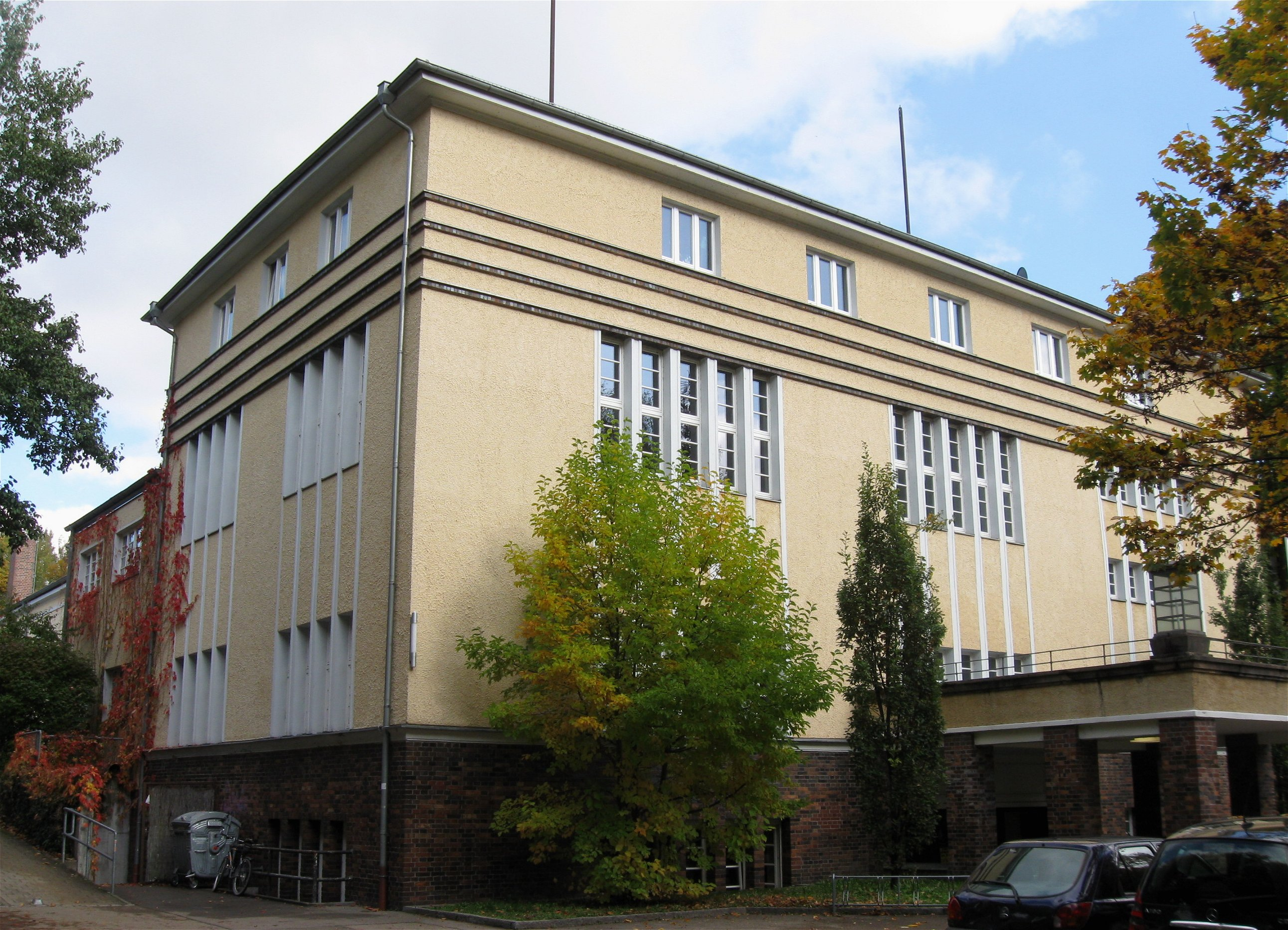 Schopperplatz 6; Turn- und Festhalle der Regensburger Turnerschaft, zweigeschossiger und gestelzter Hallenbau mit zweieinhalbgeschossigem Kopfbau mit Walmdach, Sockel, Lisenen- und Gesimsgliederungen in Klinker, Neue Sachlichkeit, 1929/30 von Albert Reiß